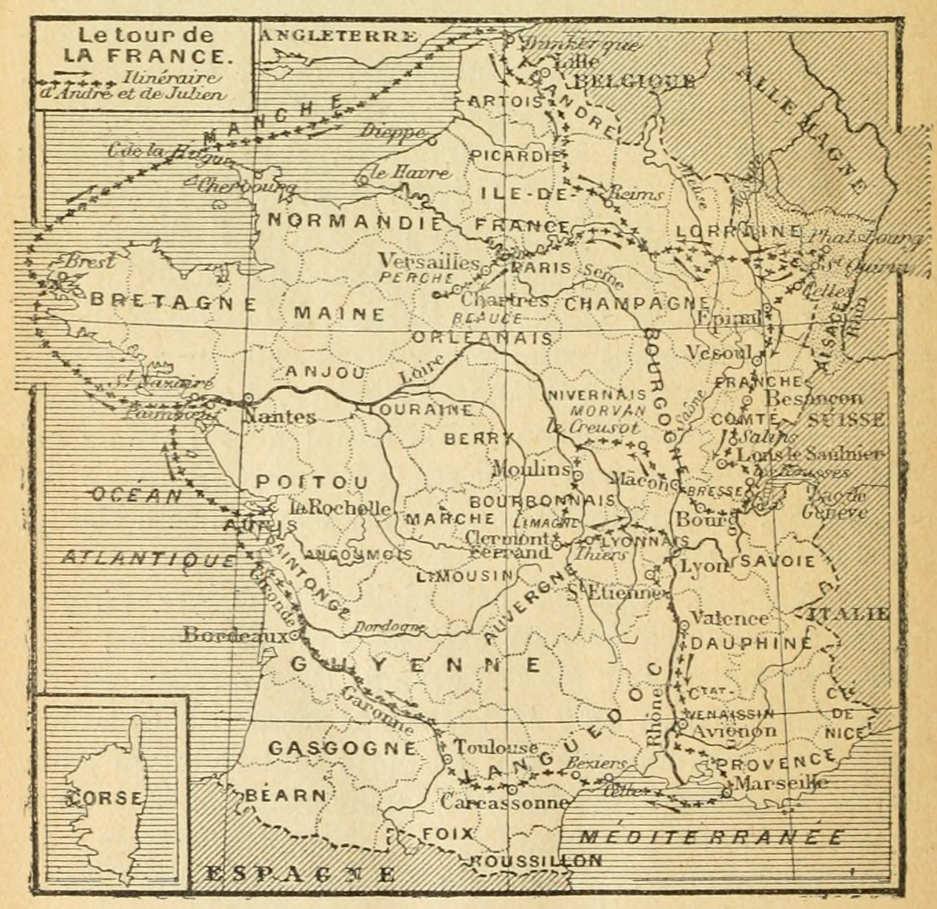 Le tour de la France par deux enfants, par George Bruno, manuel scolaire, édition de 1904.